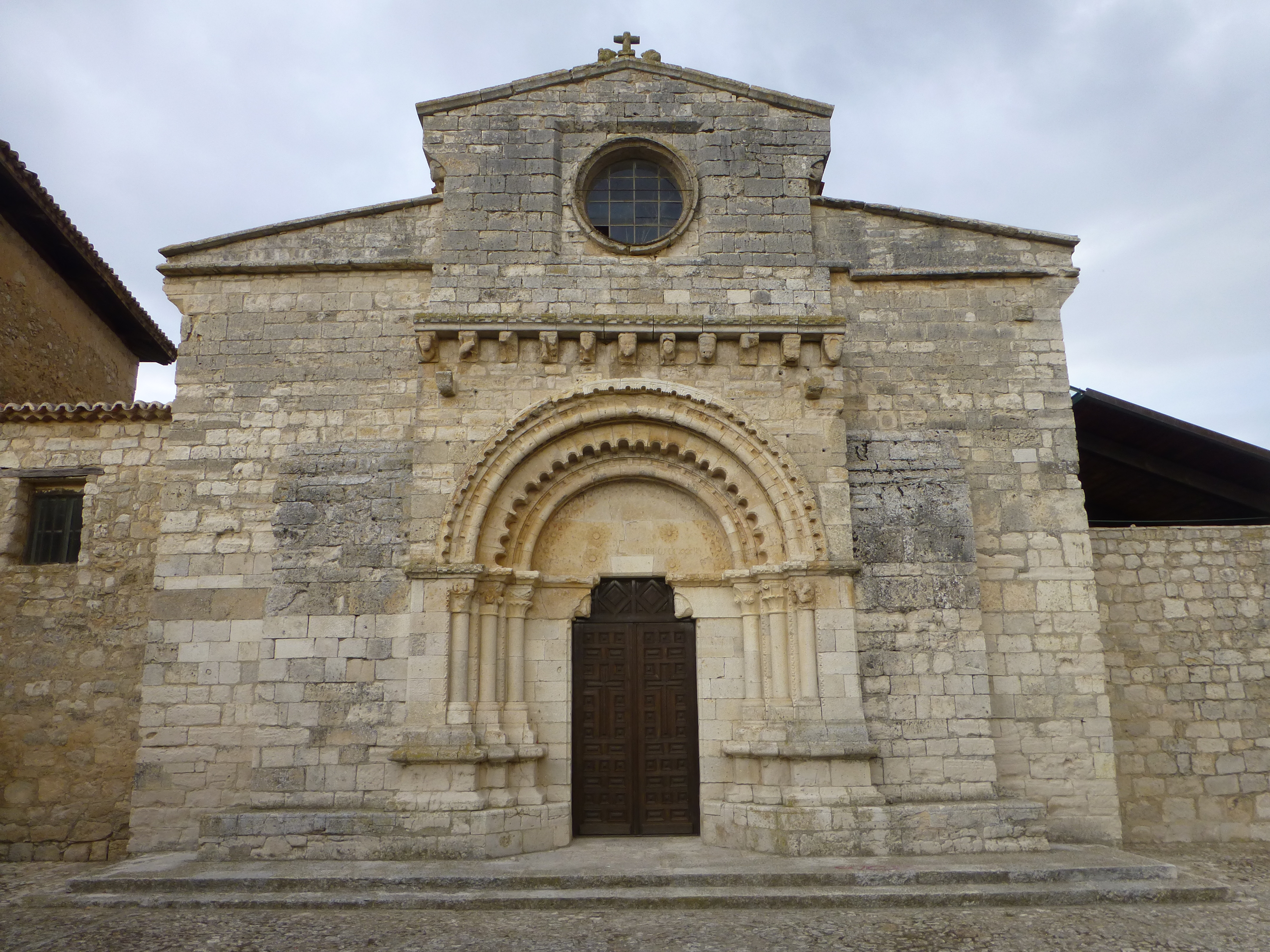 Iglesia mozárabe-románica de Santa María. Portada principal (oeste). Wamba, Valladolid, España.